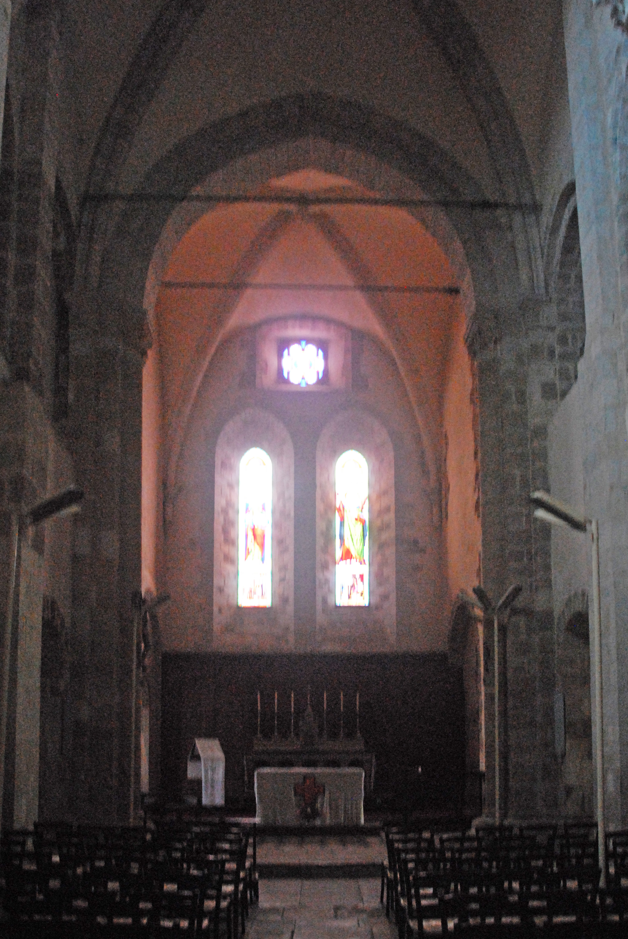 Neuvy_St.-Sépulcre, Basilika, Chor